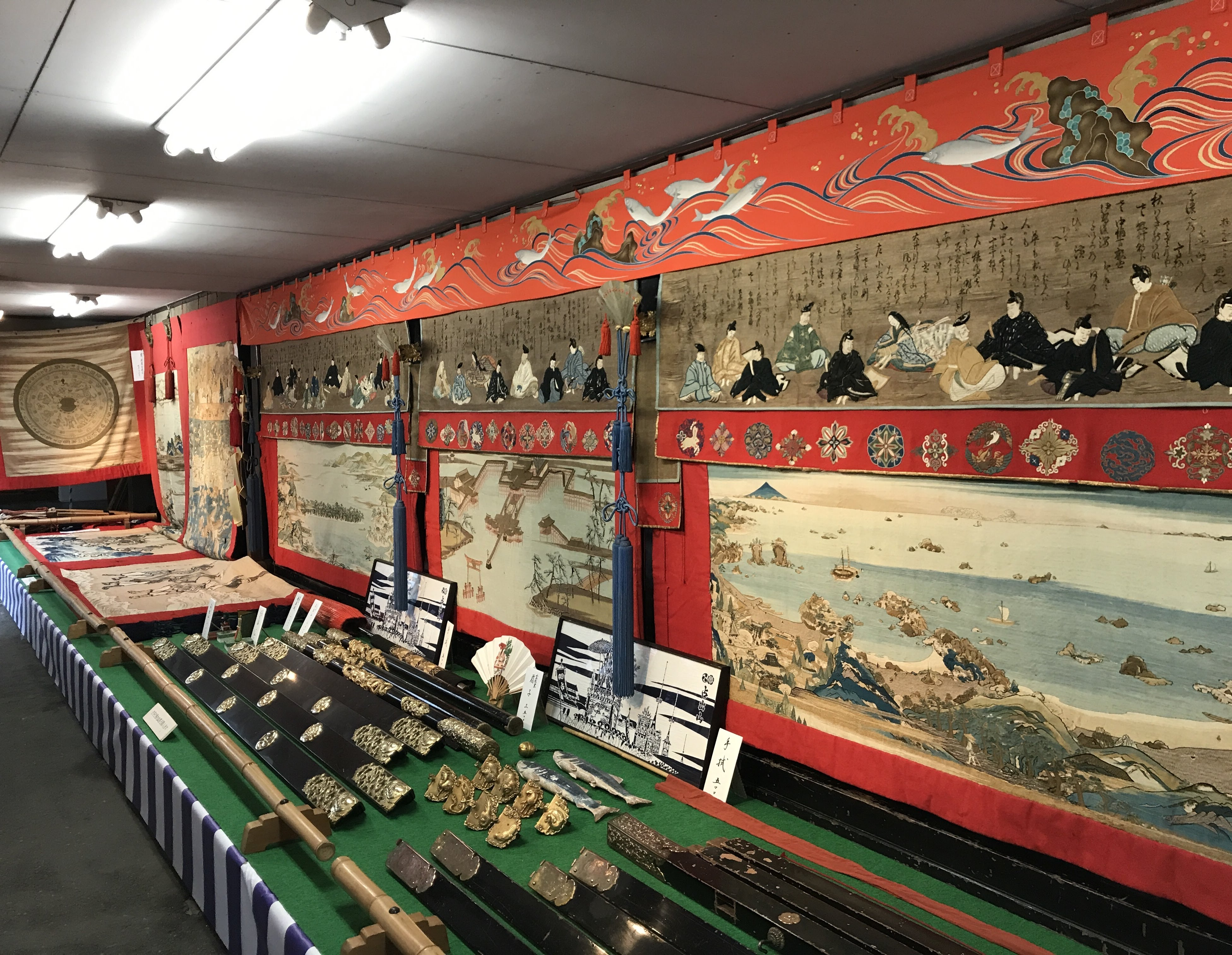 祇園祭山鉾の一つ、占出山の会所飾りの写真 2017年7月撮影